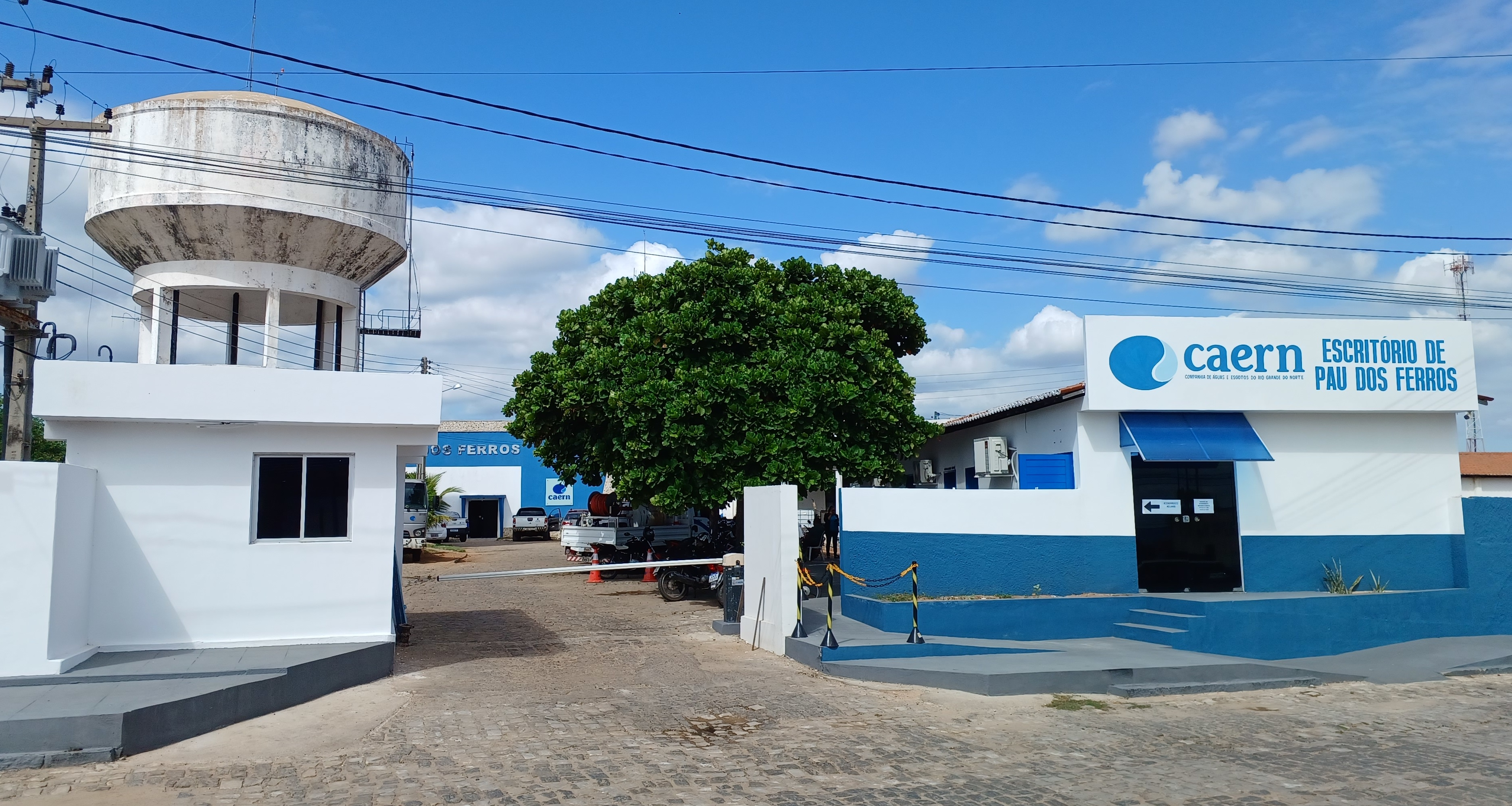 Escritório regional da Companhia de Águas e Esgotos do Rio Grande do Norte (CAERN) em Pau dos Ferros/RN (Brasil).